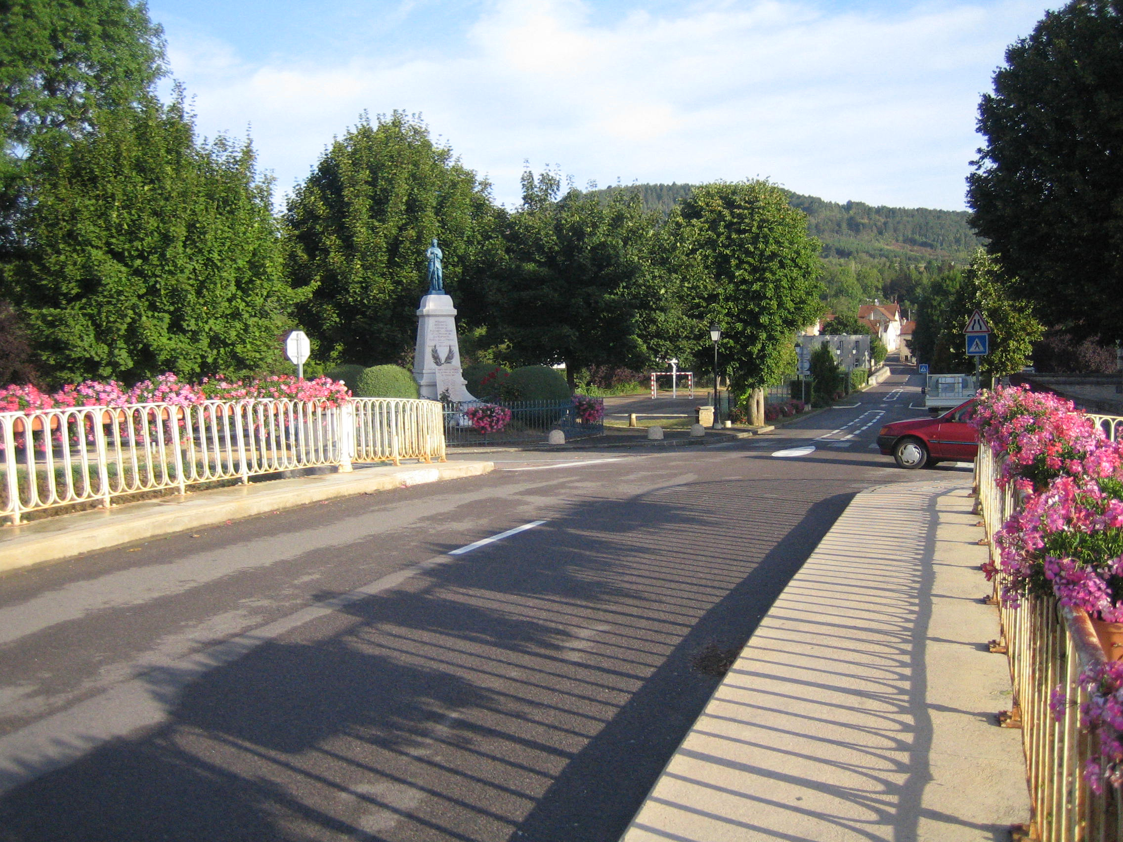 Fleurey-sur-Ouche (Côte-d'Or, France) - Le pont du canal, le Monument aux Morts, et la rue (passant devant la mairie) menant à l'église et au cimetière.